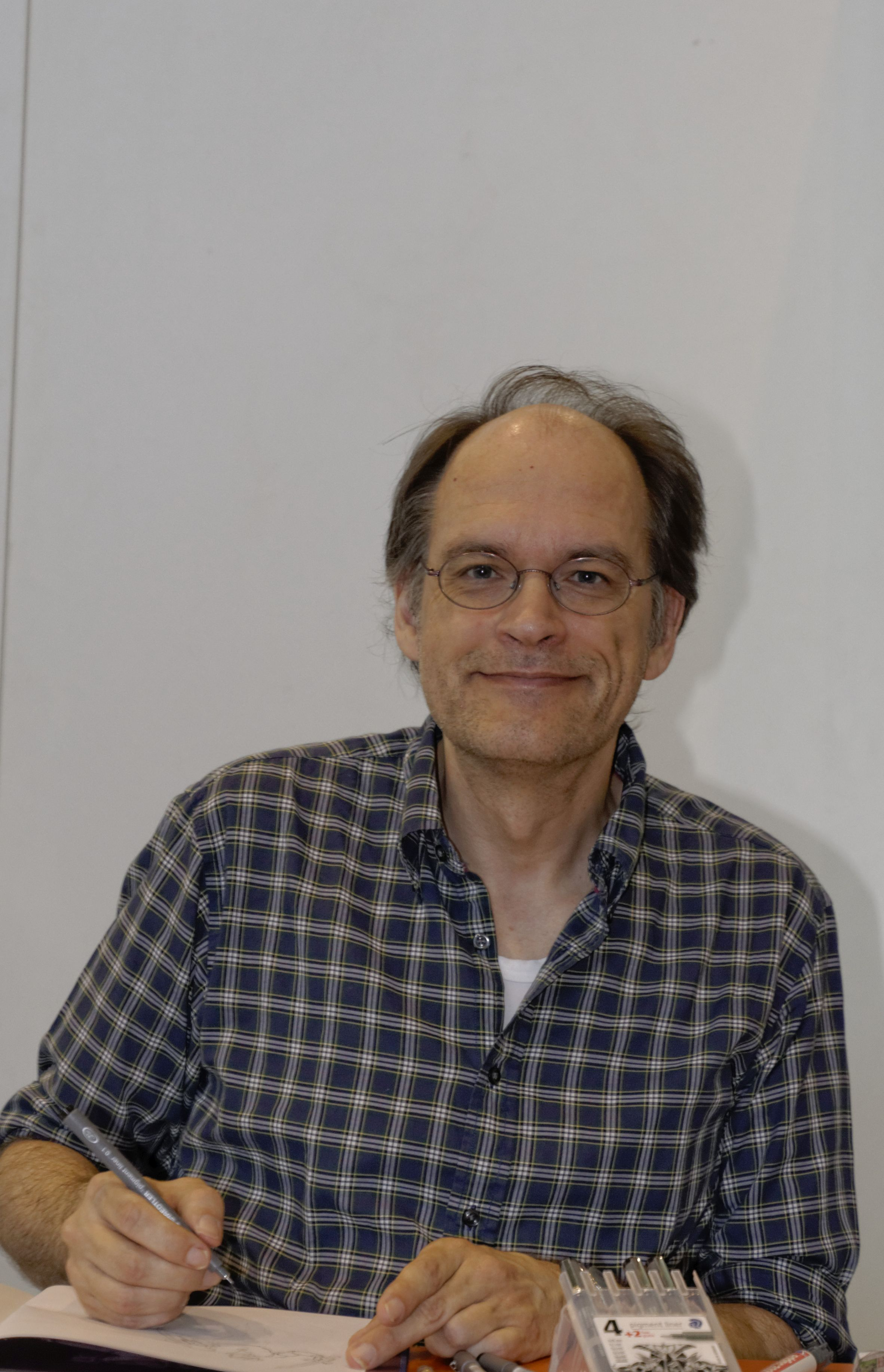 Bilder von der Comic Con Germany in Stuttgart 2018